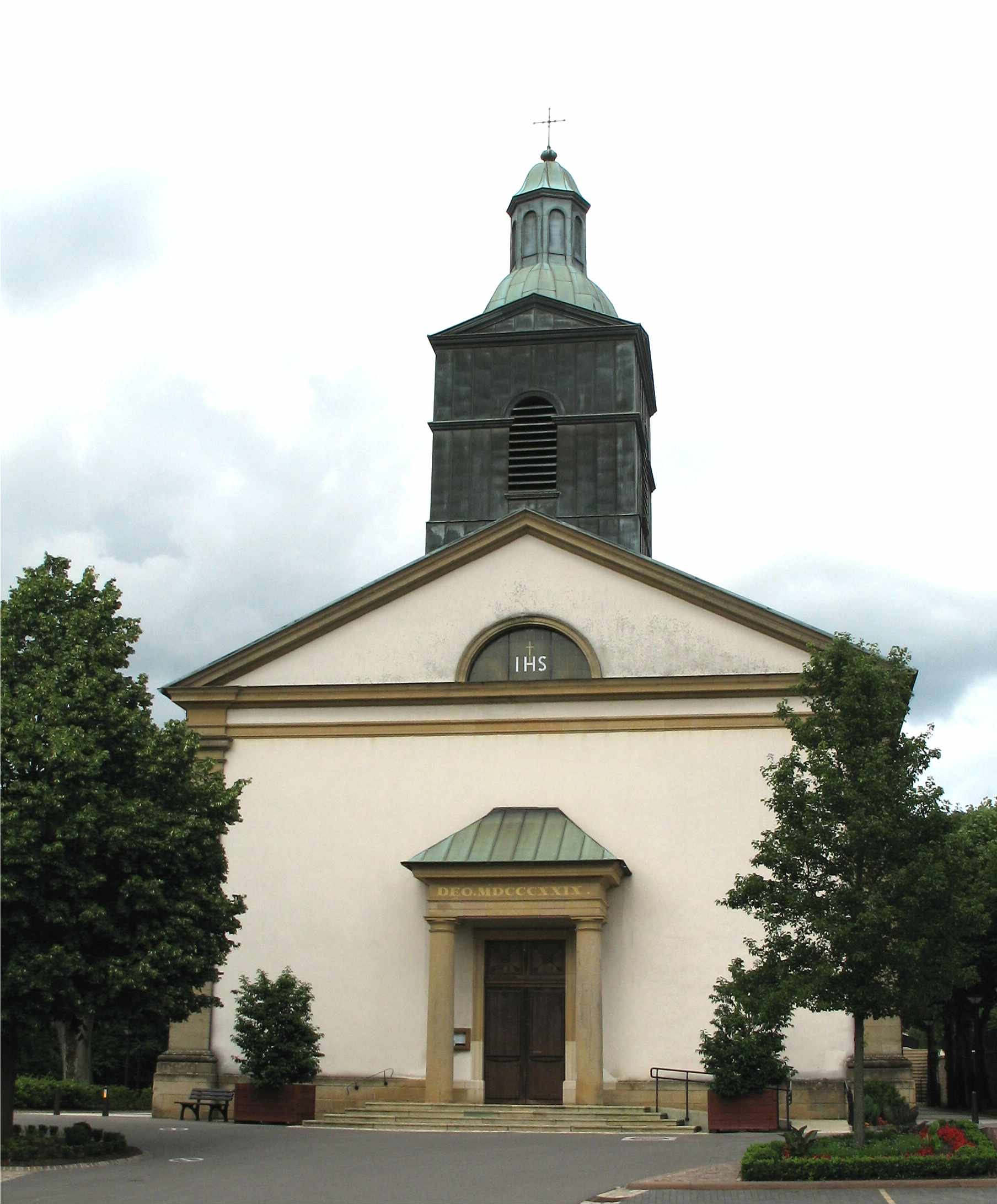 L'église de Lintgen (Luxembourg)